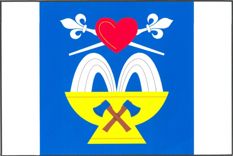 vlajka, Teplice nad Bečvou, okres Přerov